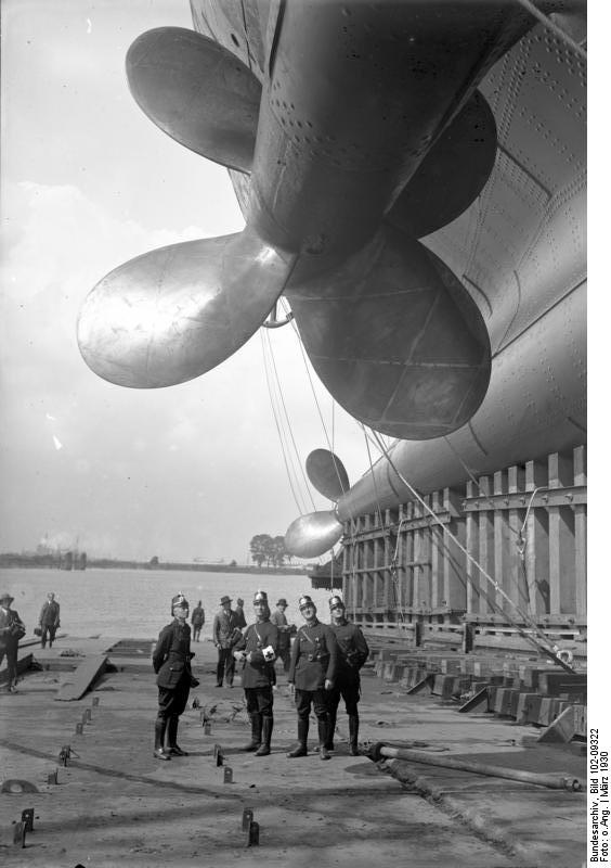 Meisterwerke deutsche Technik! Die deutsche Technik, in der ganzen Welt als führend anerkannt, hat in der letzten Zeit riesenhafte Werke vollbracht, welche beispiellos dastehen und ein hervorragedes Zeugnis deutschen Könnens ablegen. - Die riesenhaften Propellerschrauben des deutschen Ueberseedampfers "Bremen", welcher das "Blaue Band" in 4 Tagen, 17 Stunden und 24 Minuten für Deutschland eroberte.